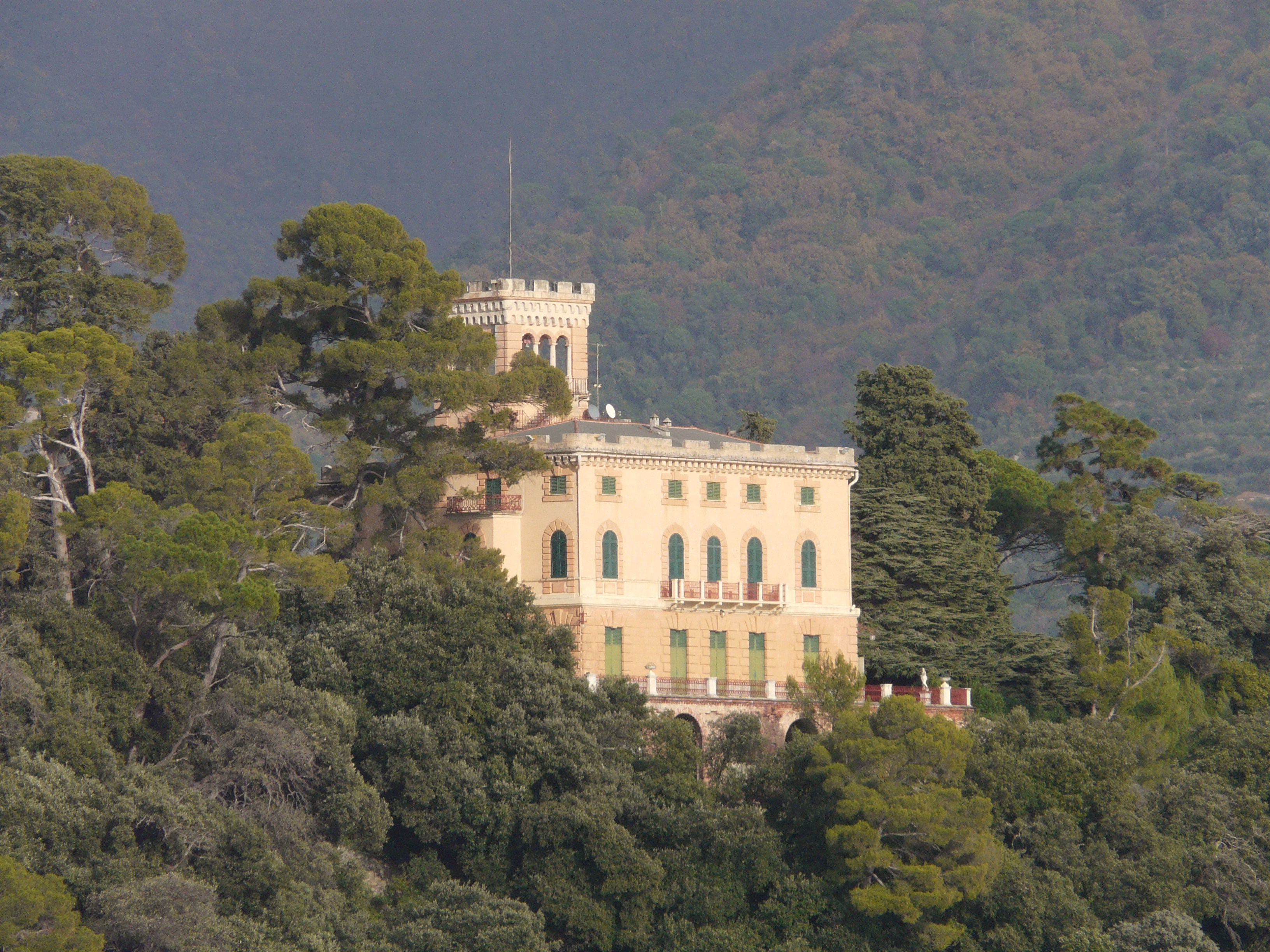 Villa dell'Ordine di Malta (vista dal versante di Santa Margherita Ligure), San Michele di Pagana, Rapallo, Liguria, Italia